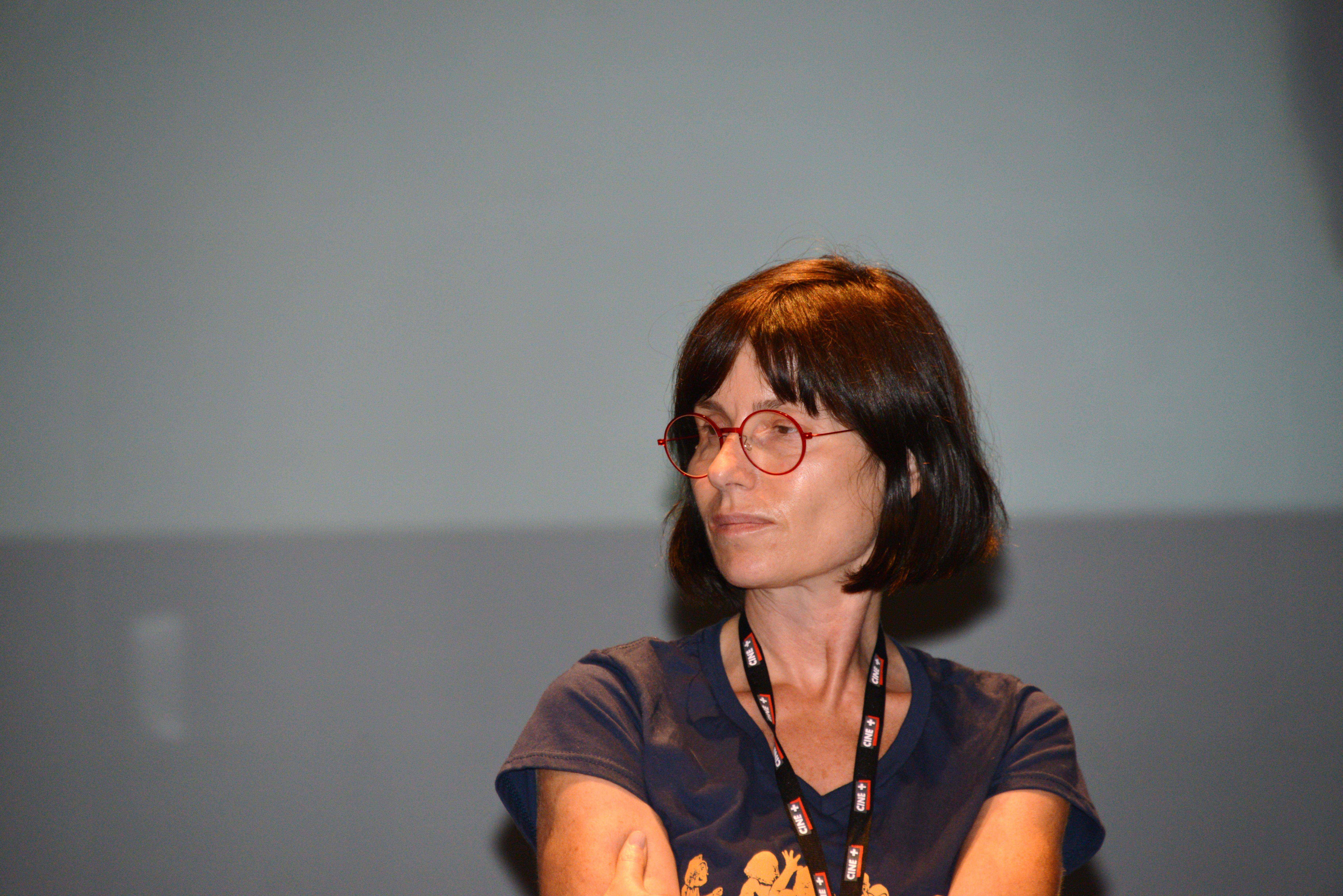 La cinéaste turque Yeşim Ustaoğlu au Festival International du Film de La Rochelle 2016: Rencontre avec la réalisatrice turque Yeşim Ustaoğlu et le directeur du Festival du Film d’Istanbul Kerem Ayam animée par Ariel Schweitzer, Théatre Verdière, La Coursive, mardi 5 juillet 2016 à 16h15. La Rochelle, Charente-Maritime, France.